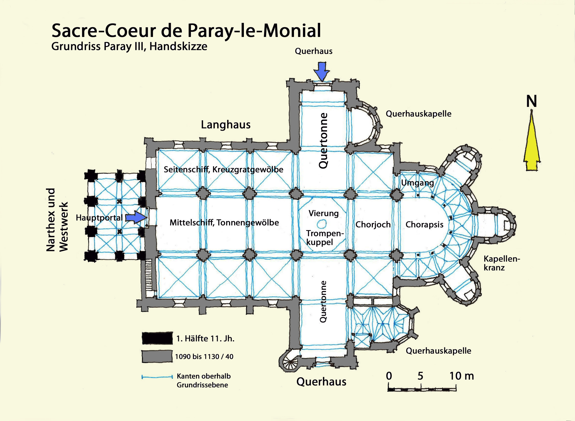 Paray-le-Monial,_Grundriss, Handskizze